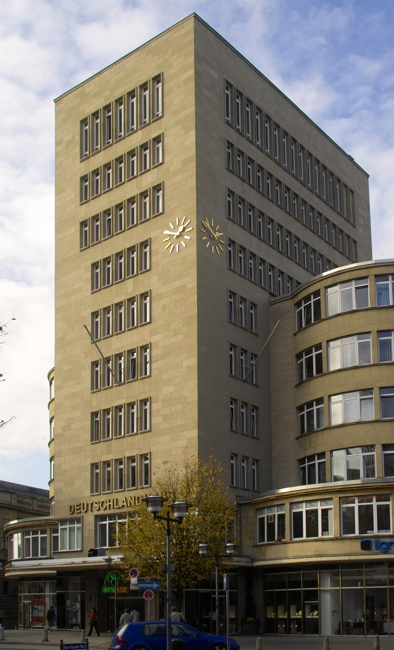 Deutschlandhaus in Essen (Germany), 1928 by architect Jacob Koerfer.